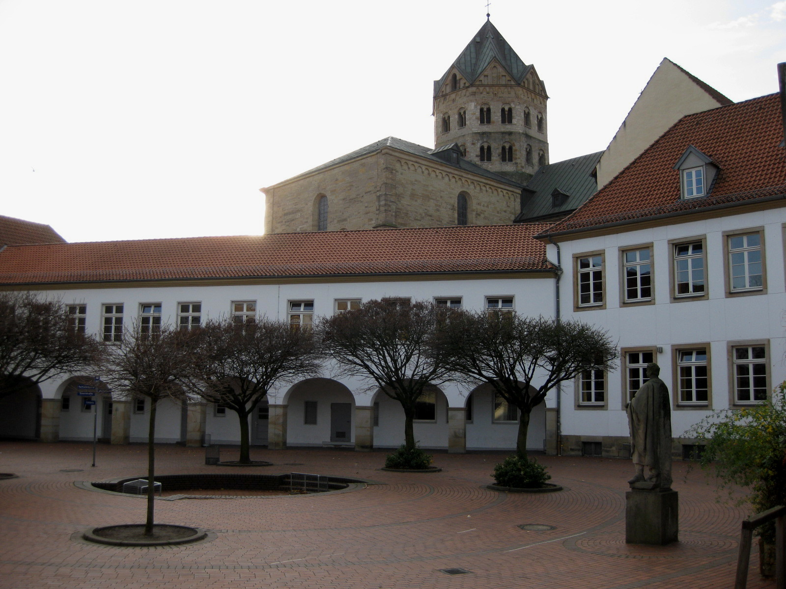 Schulhof des Gymnasium Carolinum (Osnabrück)